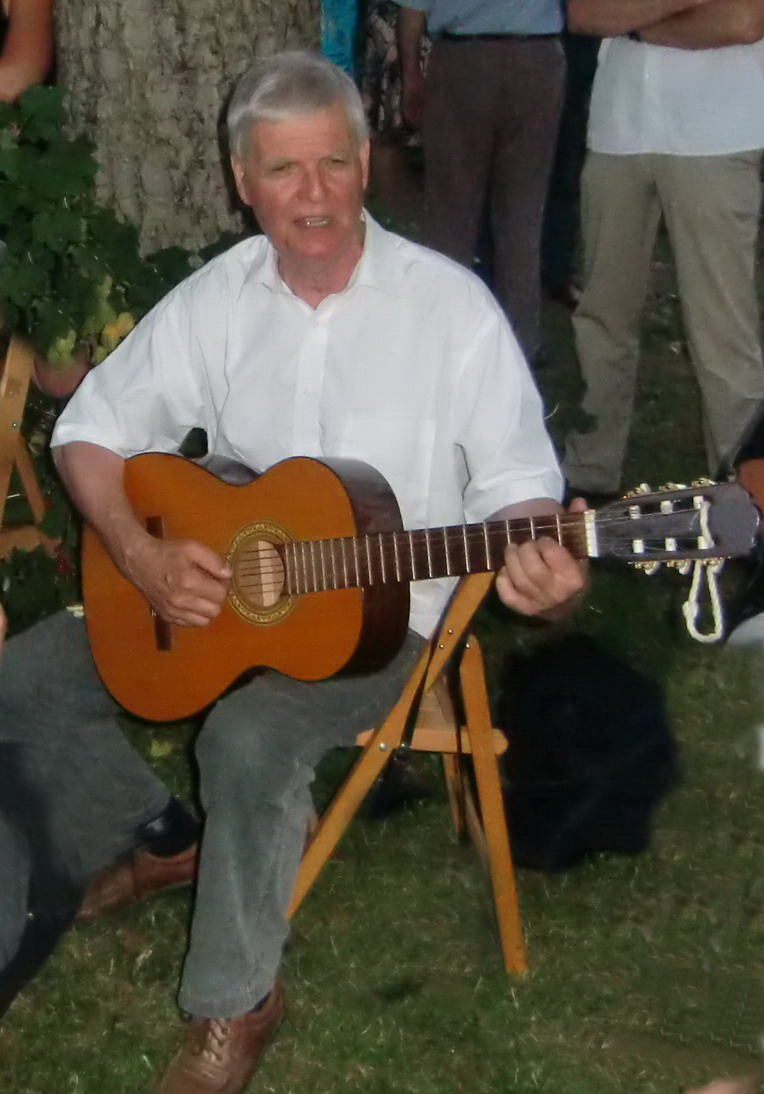 Der Puppenspieler Frieder Simon zwanglos